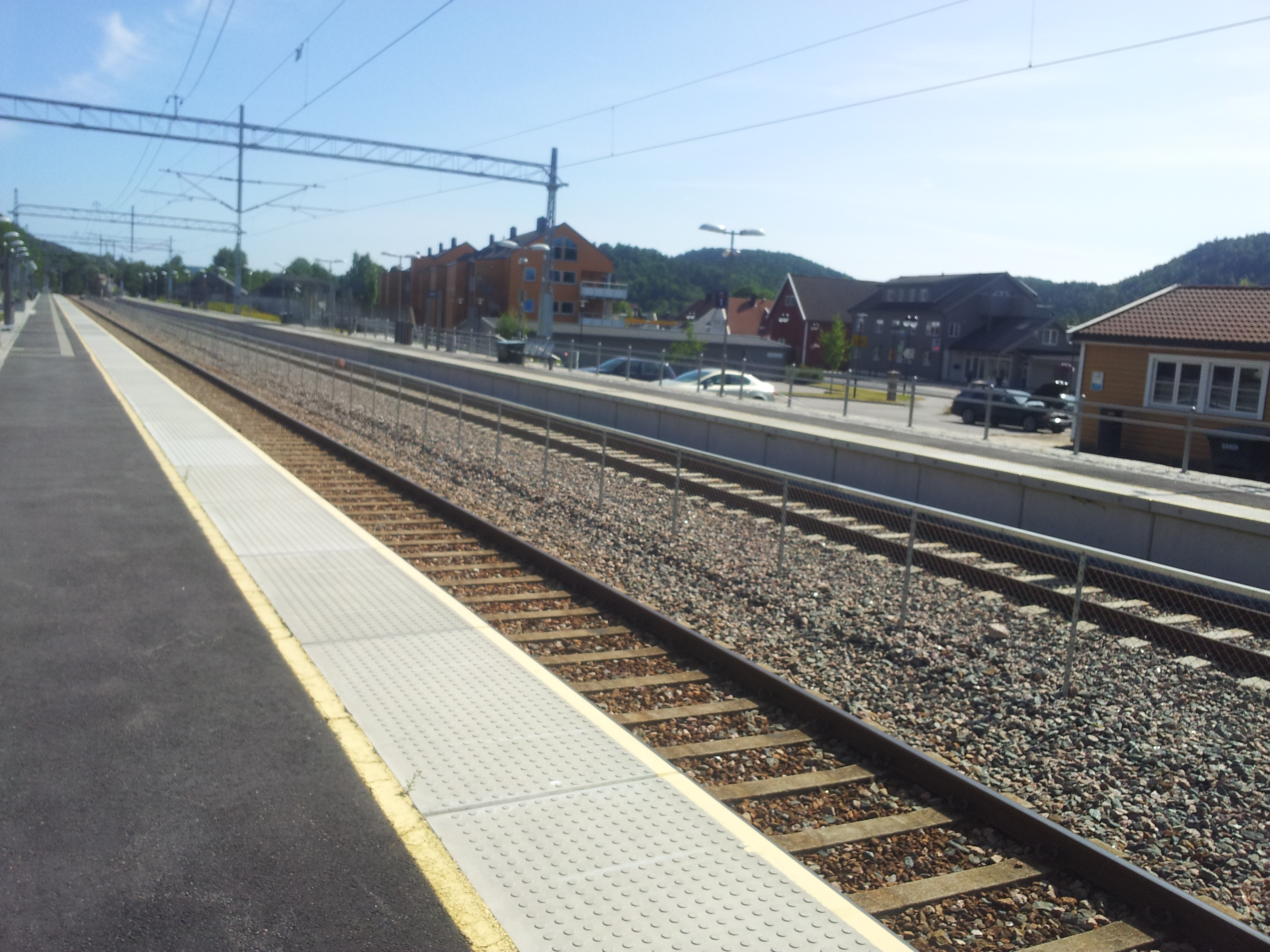 Nodeland stasjon 2013